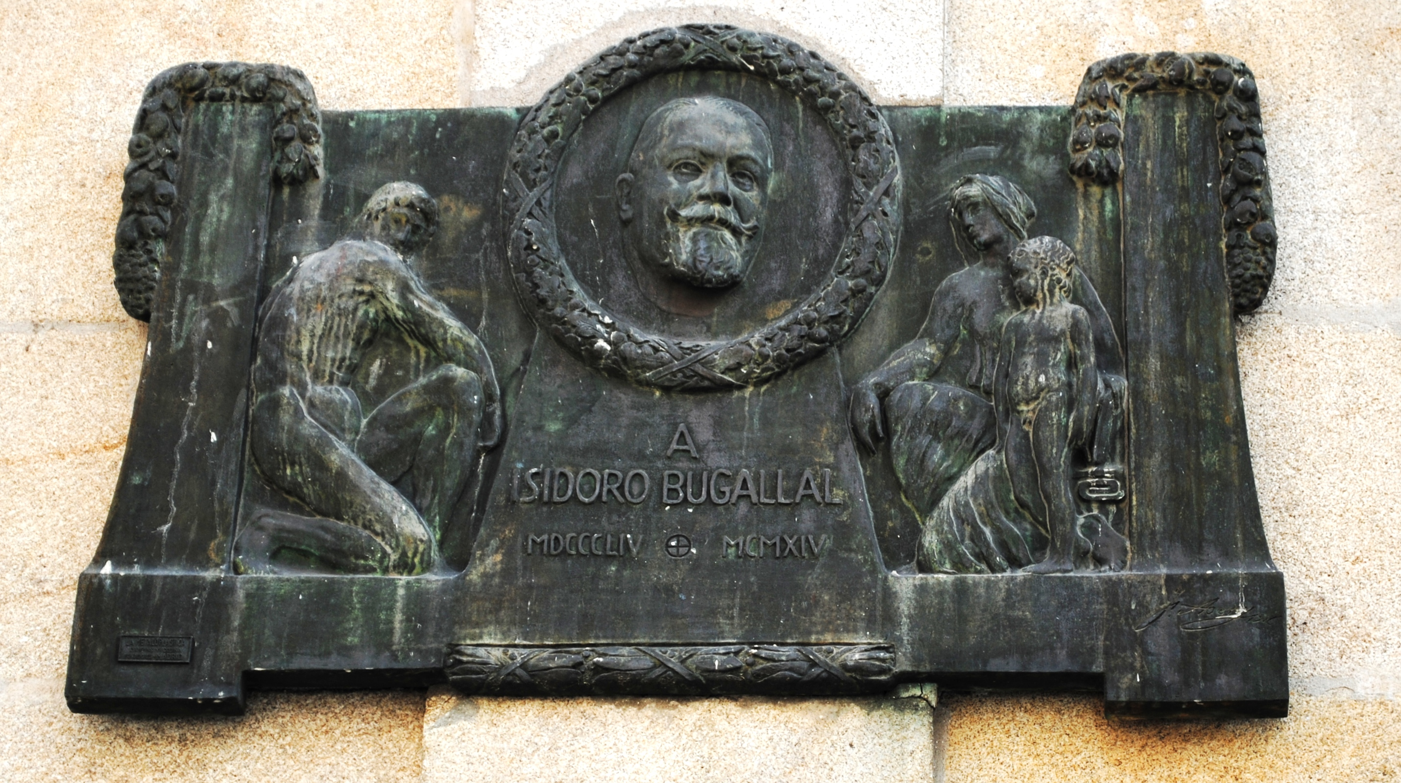 Asorey a Isidoro Bugallal MDCCCLIV-MCMXIV